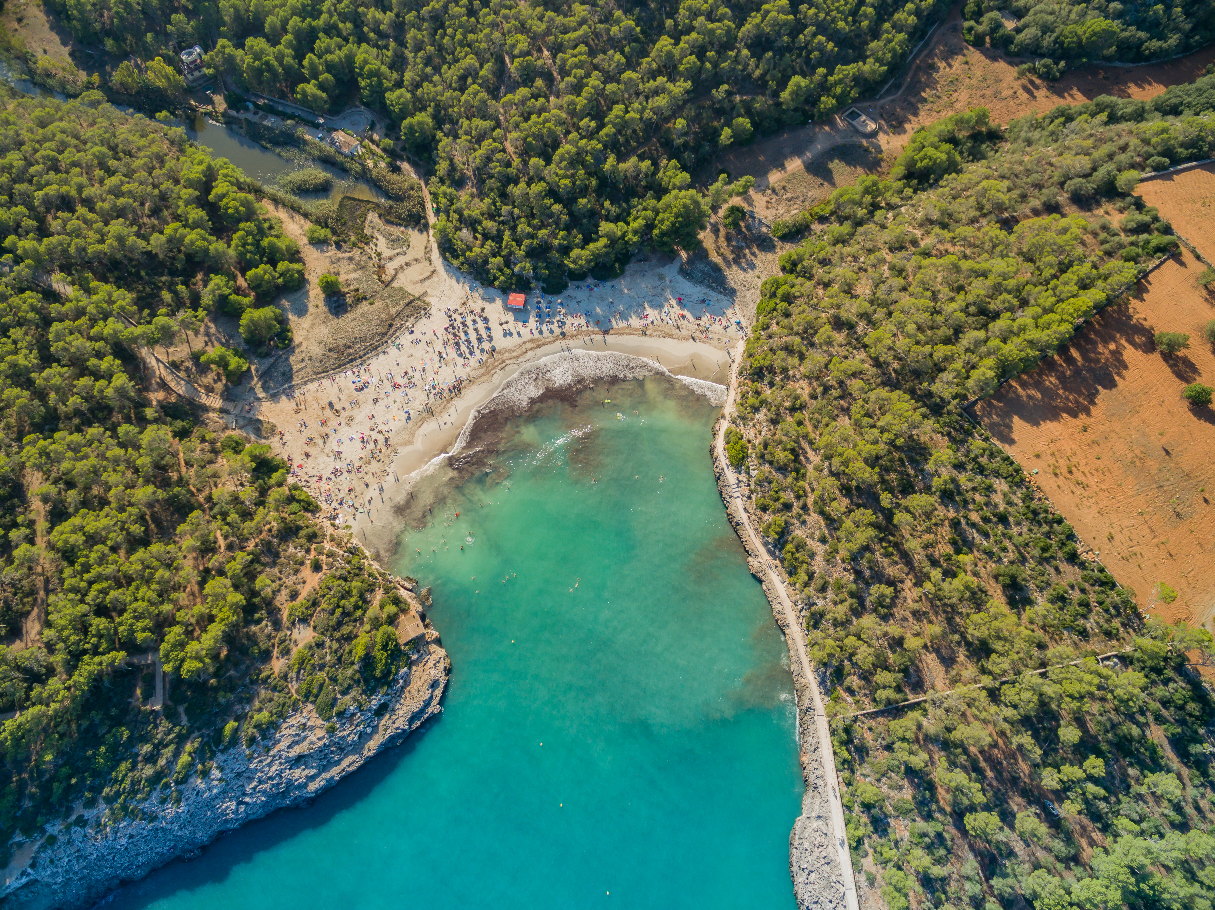 Mallorca schönste Strände Cala S'Amarador